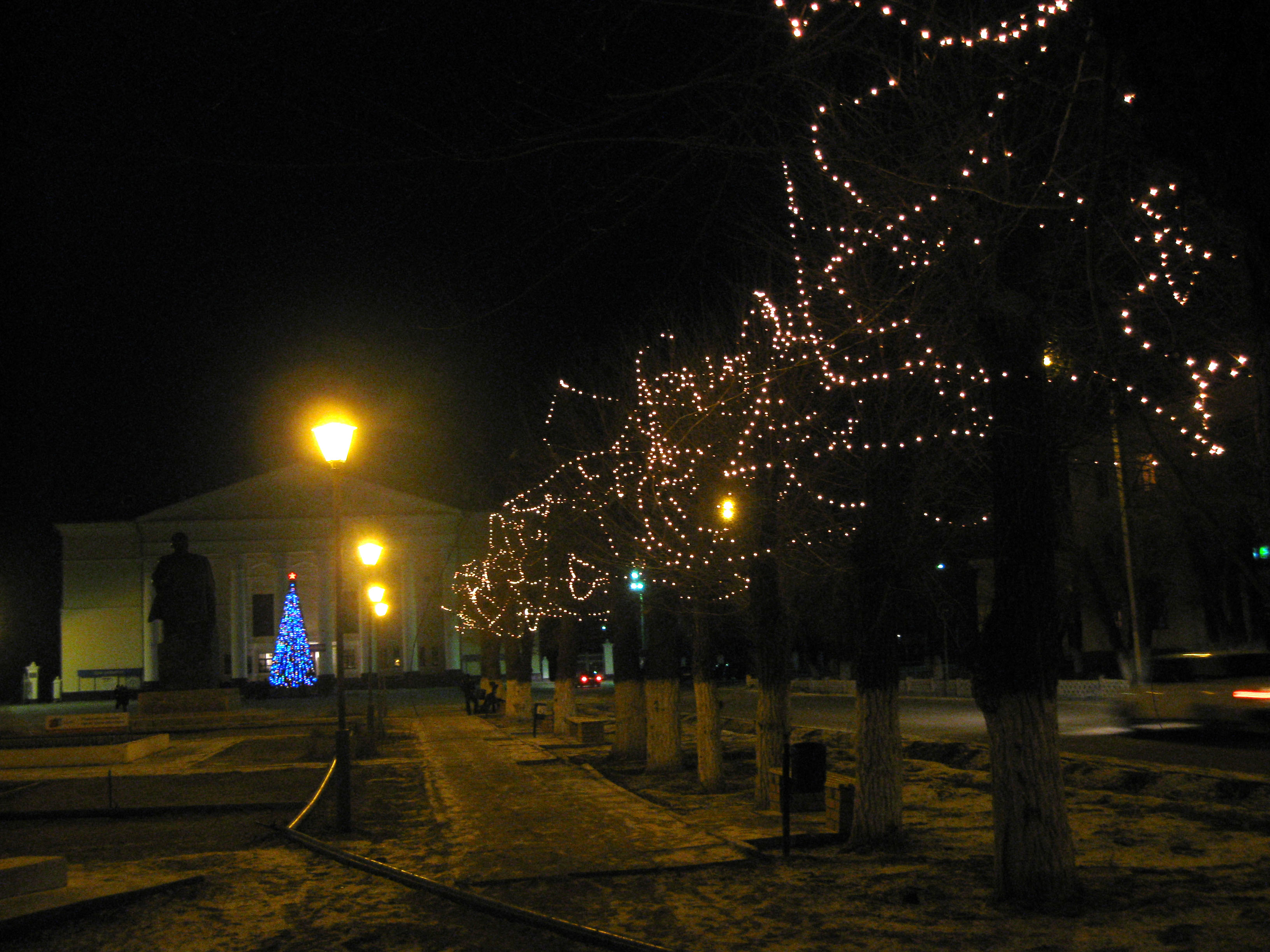 сквер на площади Ленина, Ахтубинск